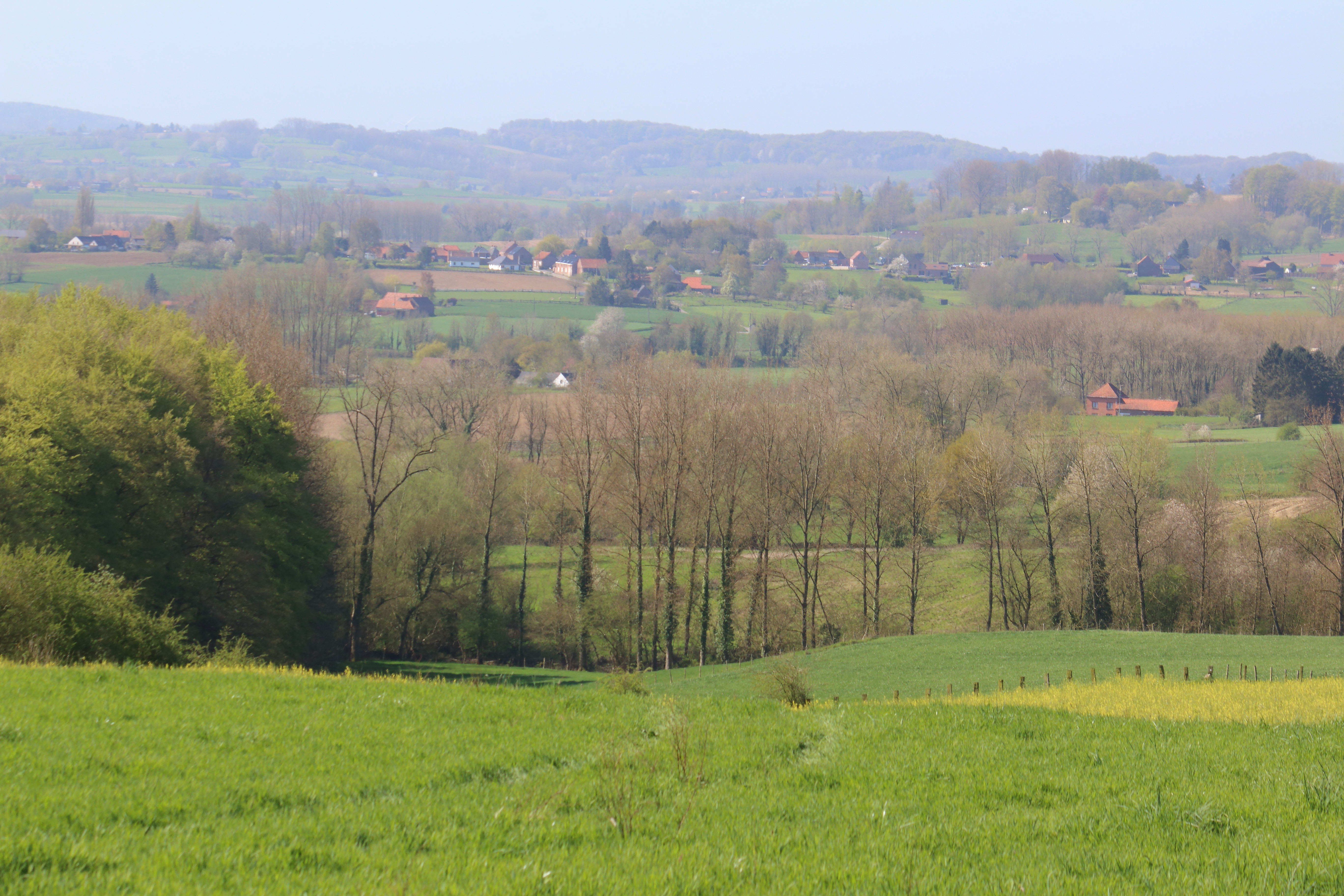 parc naturel du Pays des Collines, zicht vanuit Bois/Ten Bosse, Flobecq/Vloesberg, Henegouwen, Wallonië, België